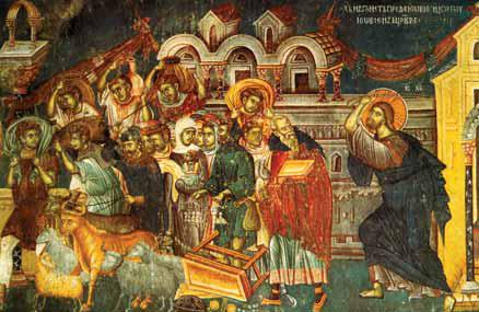 Freska:Izgonuvanjeto na trgovcite od hramot vo crkvata Sv. Nikita, s. Banjani, Skopsko (XIV v.)